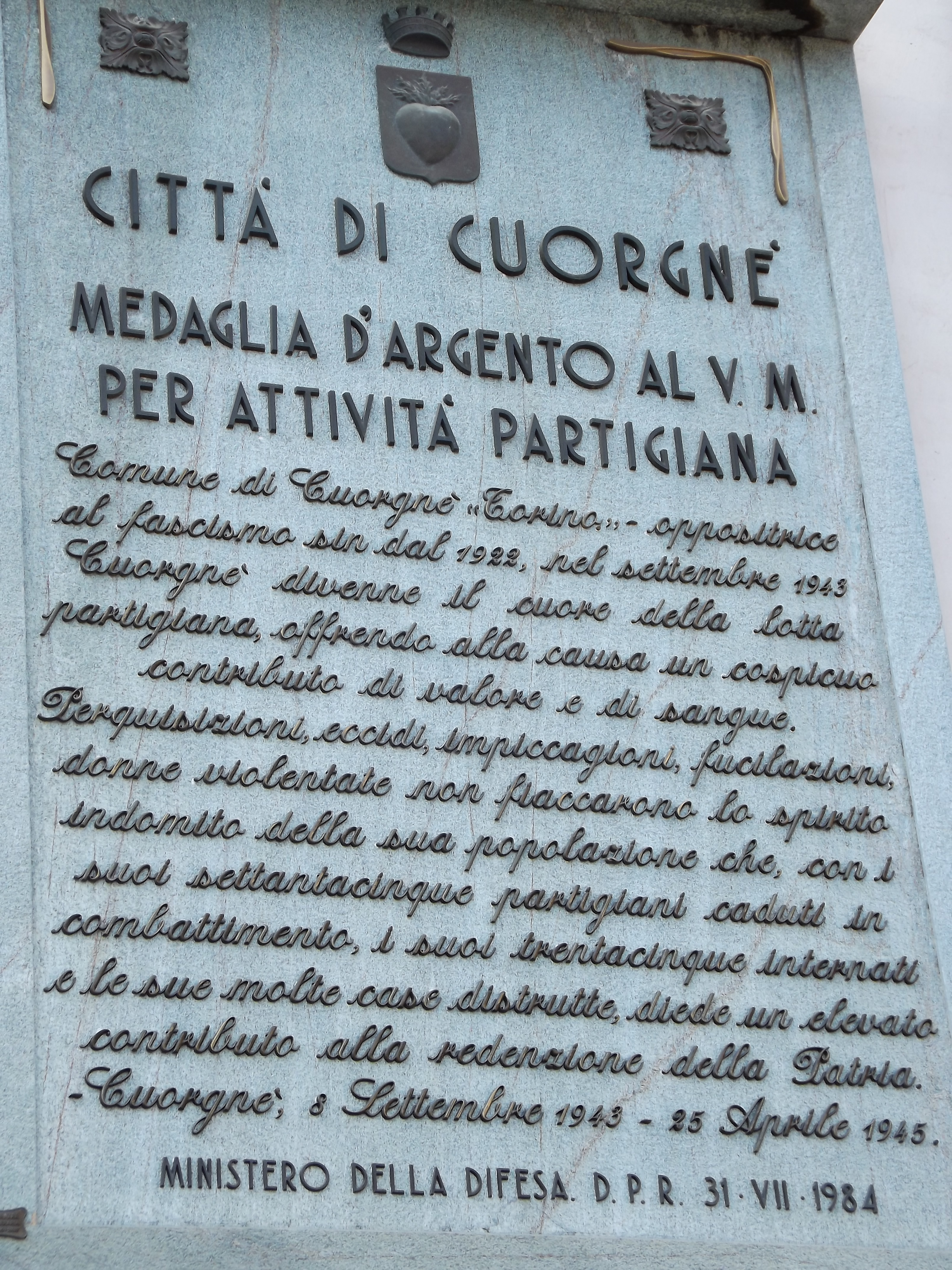 Lapide commemorativa Medaglia d'Argento per attività Partigiana. Dedicata ai caduti della resistenza sulla facciata del Palazzo comunale di Cuorgnè (To), in Piazza Morgando.